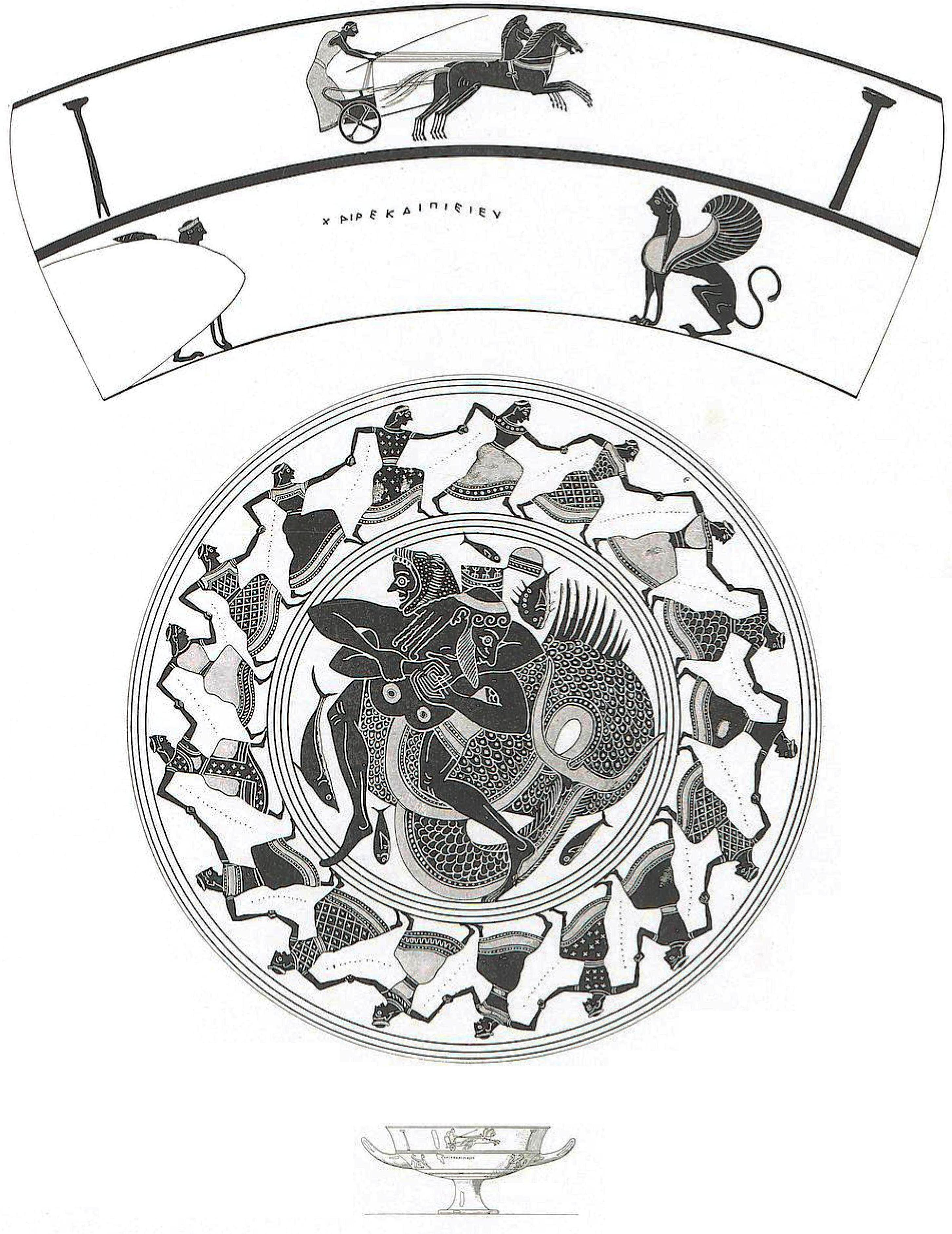 griechische Kylix mit Herakles und Triton